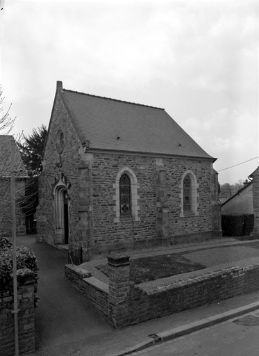 Chapelle de l'Immaculée-Conceptionà Val-d'Izé (35).